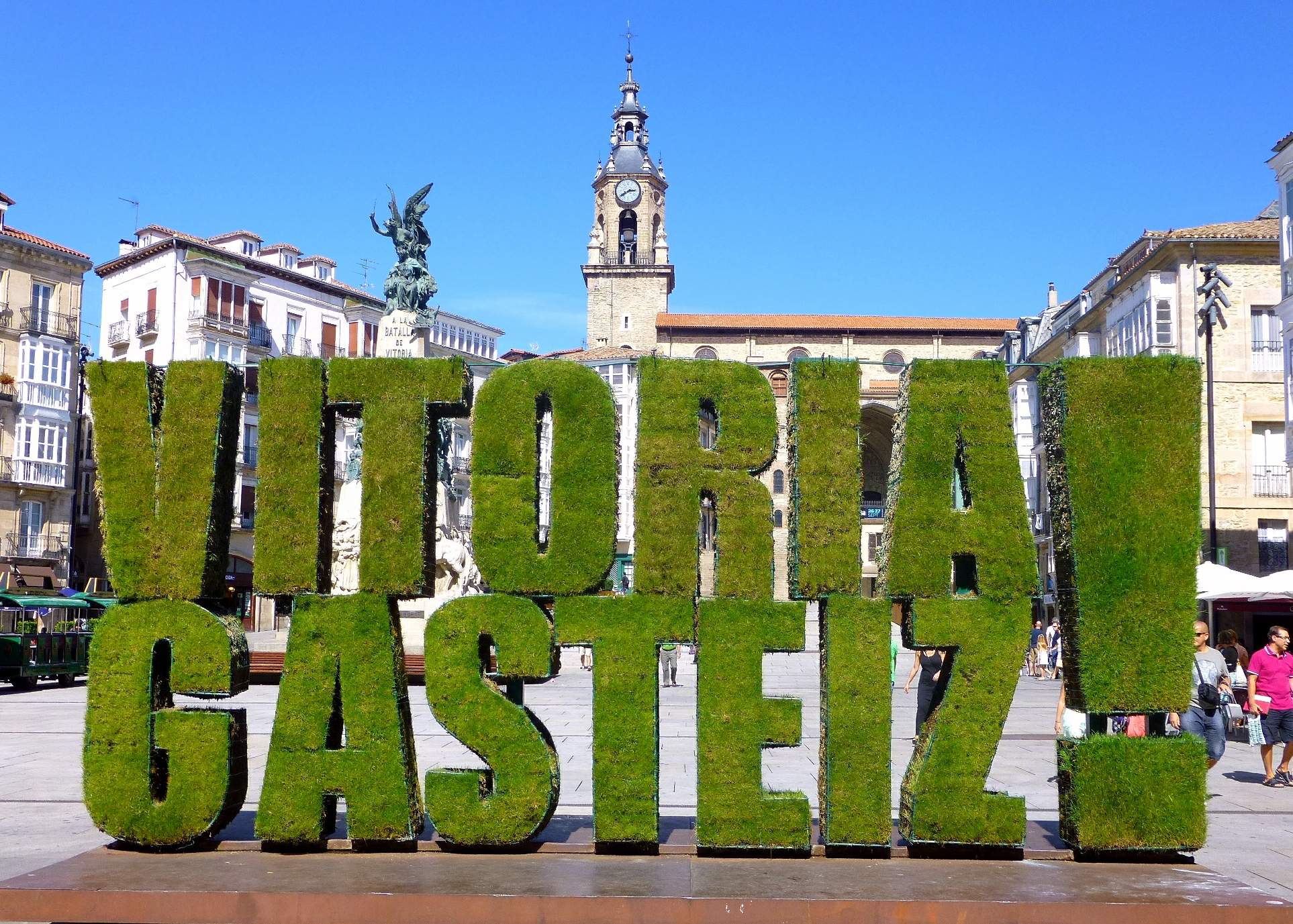 Logo vegetal ' Vitoria Gasteiz ! ', en la Plaza de la Virgen Blanca de Vitoria